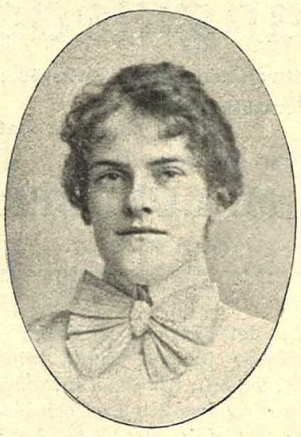 Charlotte Björnstjerna i veckotidningen Idun 1901.